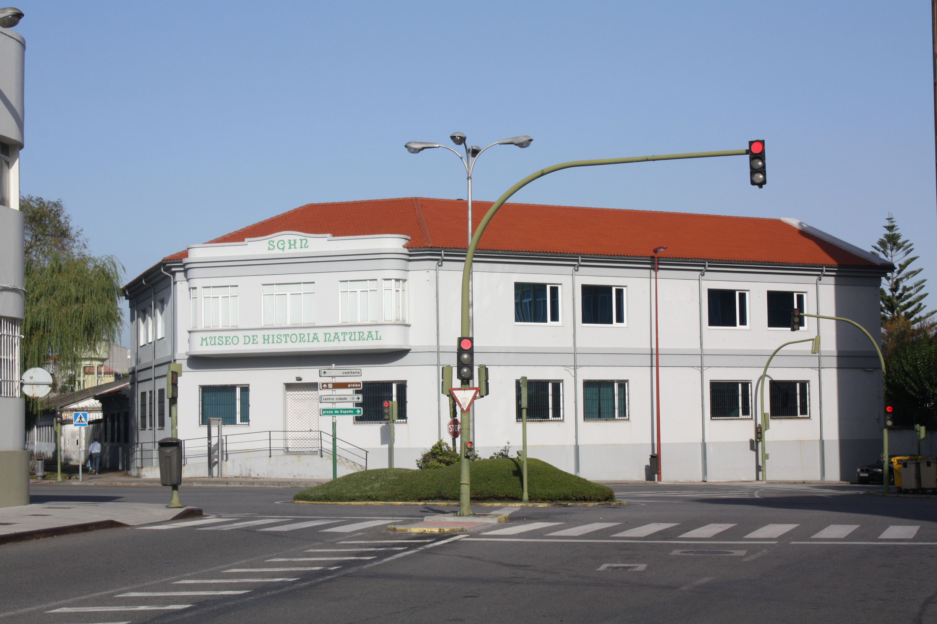 Museo da Sociedade Galega de Historia Natural, no barrio de Canido, en Ferrol (A Coruña)